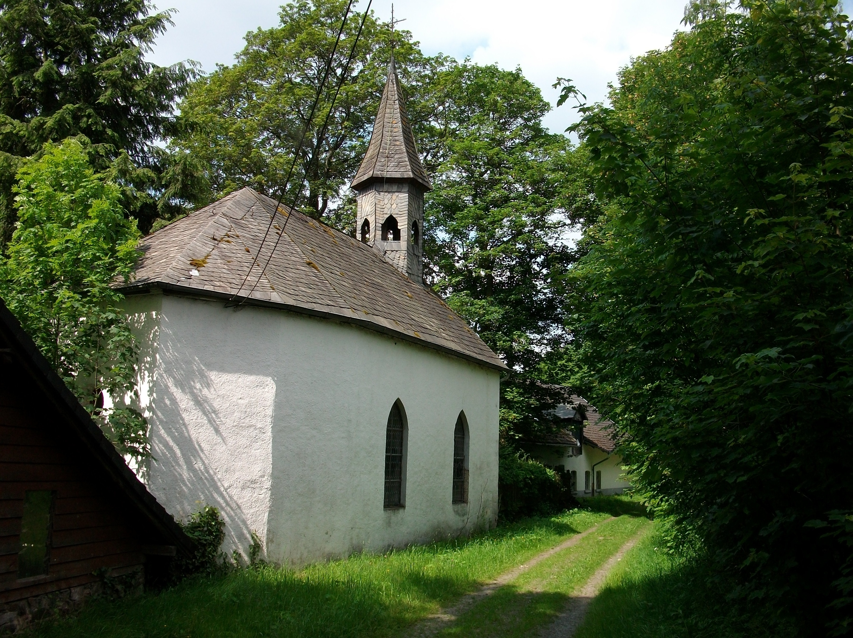 Hubertuskapelle, Familienkapelle des Gutes Stockhausen in Meschede (Germany)